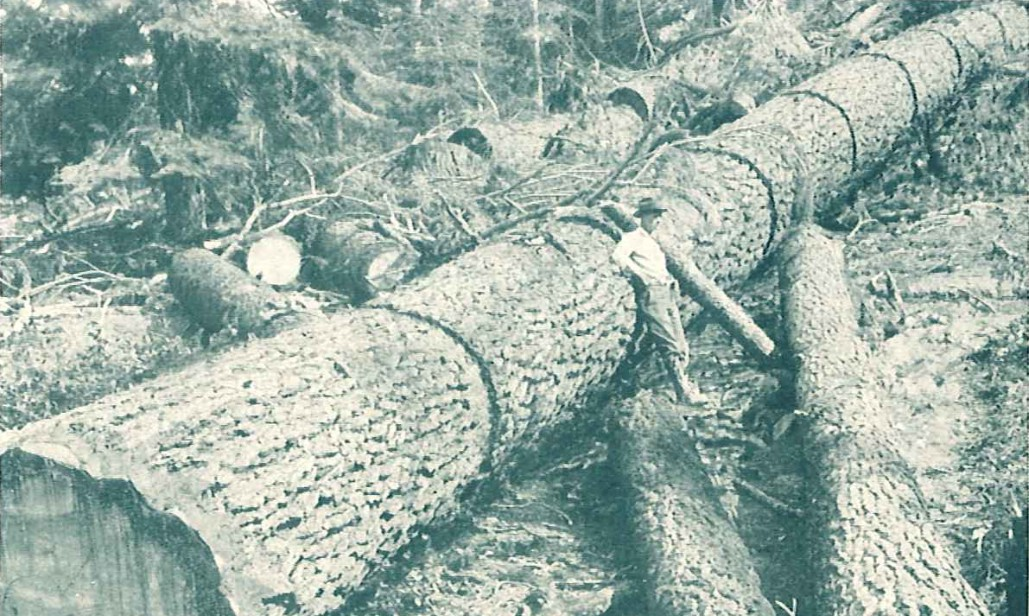 Zdjęcie ze str. 5 publikacji przygotowanej przez Western Pine Association o gospodarczym wykorzystaniu sosny Lamberta (Pinus lambertiana). Podpis pod ilustracją: Sugar Pine trees, due to their huge size and comparative freedom from side branches, yield a high percentage of clear lumber (...).